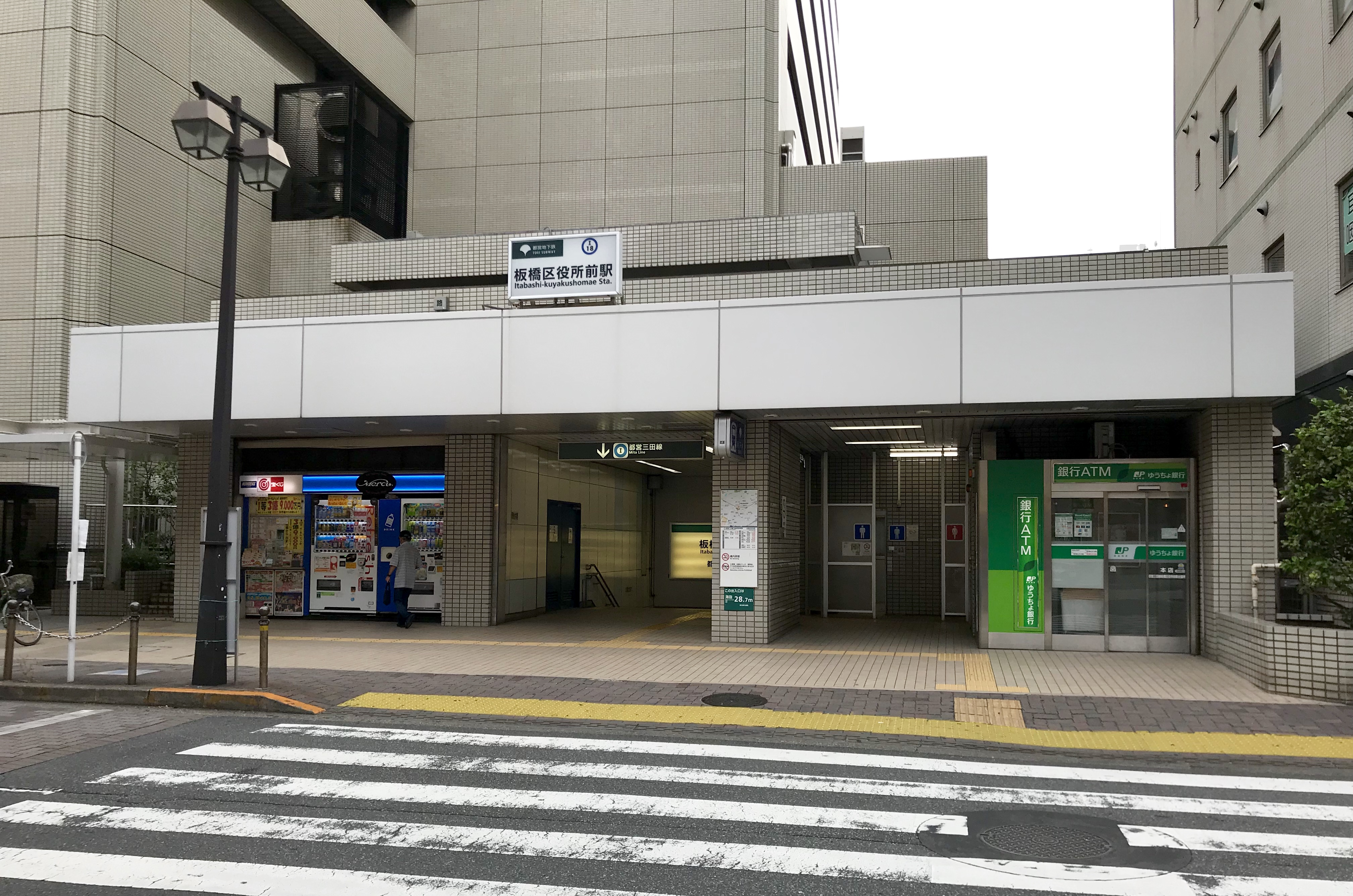 都営地下鉄三田線板橋区役所前駅A2番出入口